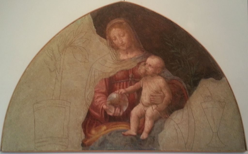 Bernardino Luini, Madonna che allatta il Bambino, Museo diocesano, Milano